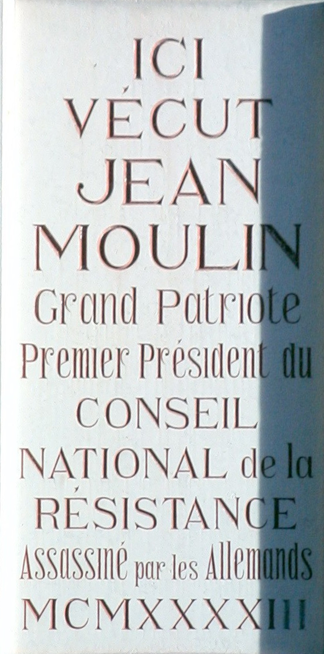 Plaque signalant le lieu d'habitation de Jean Moulin, à Montpellier, Grand rue Jean Moulin.